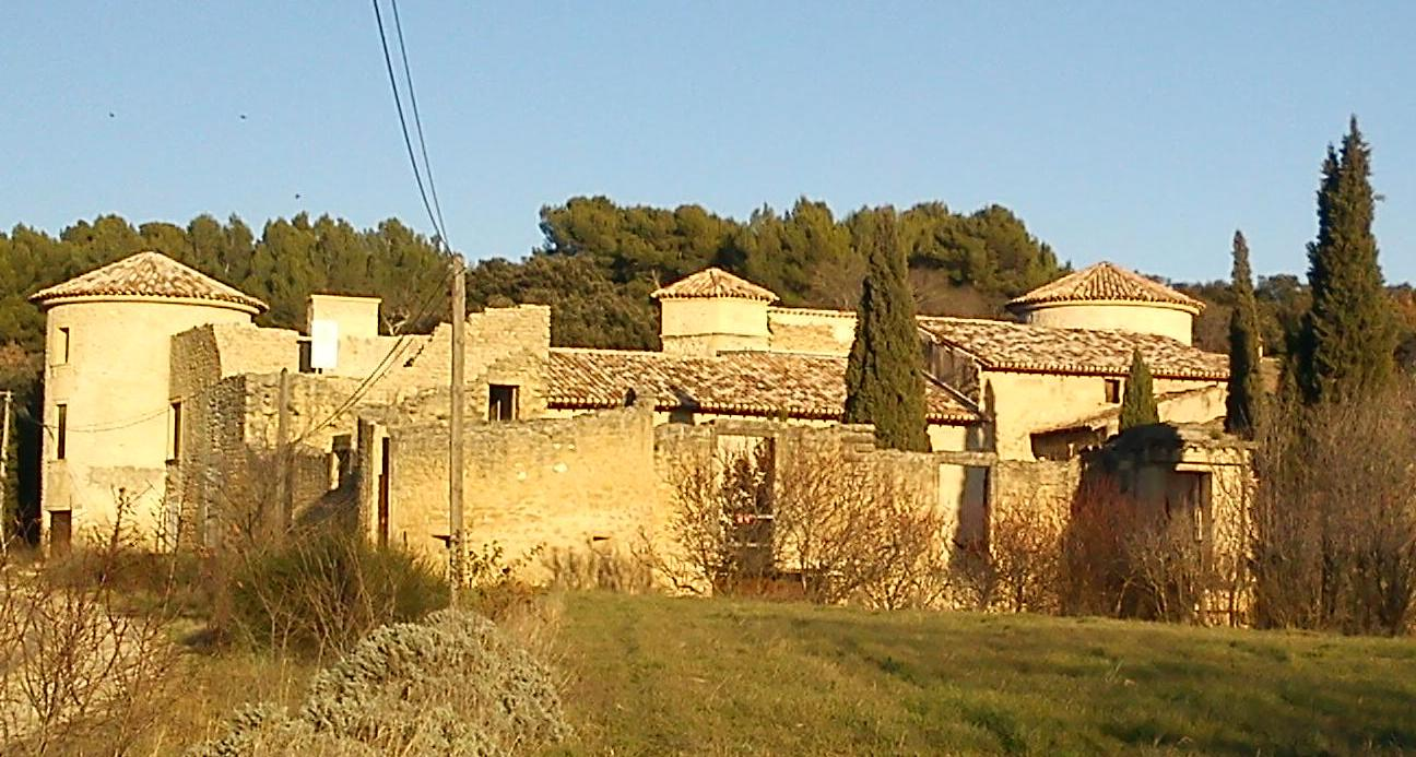 Chateau de Forbin à Villelaure (84)